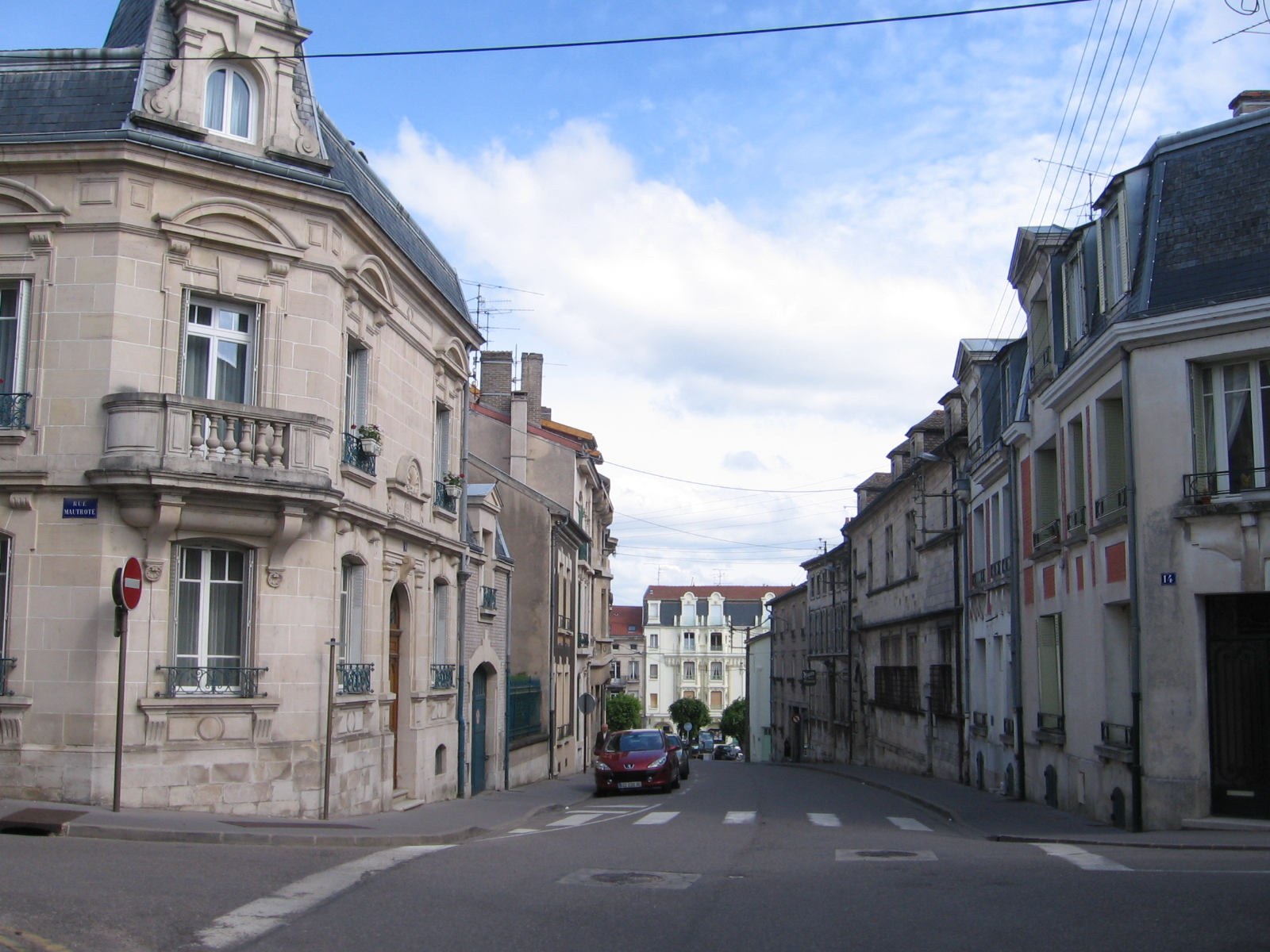 Verdun